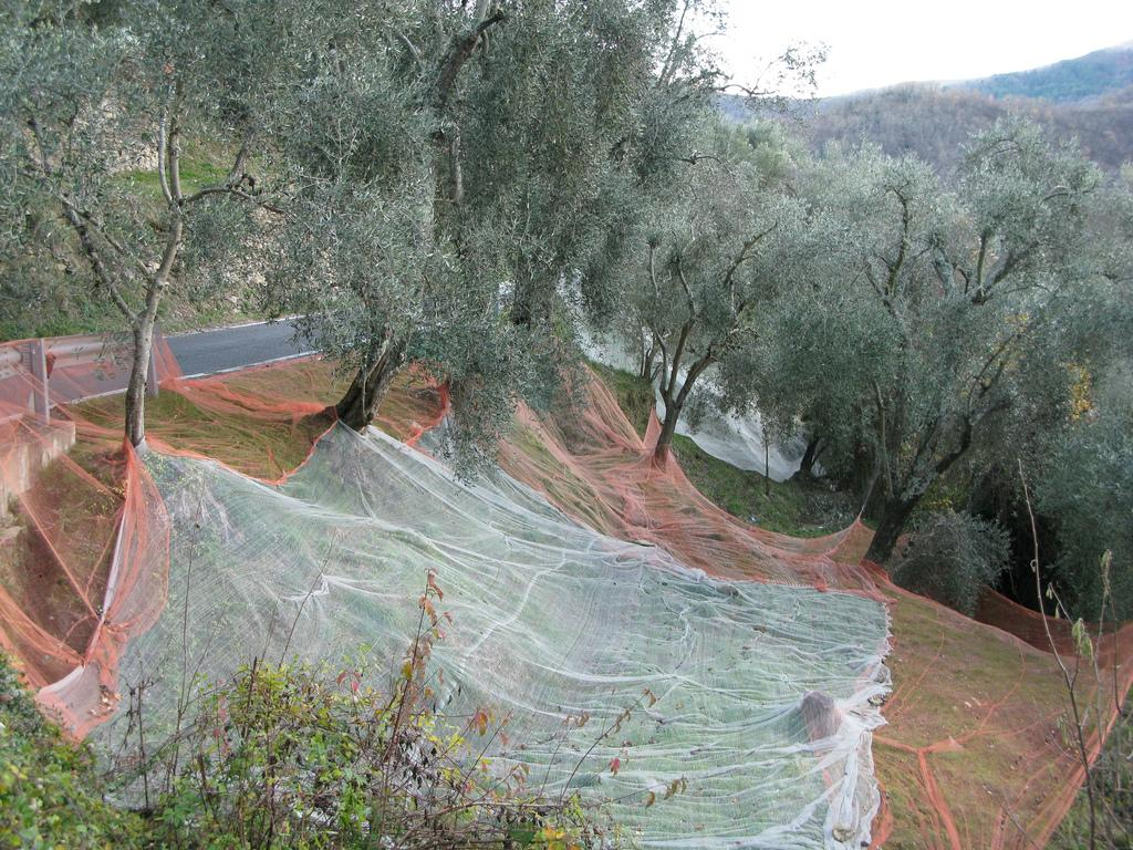 Passo del Ginestro-uliveto